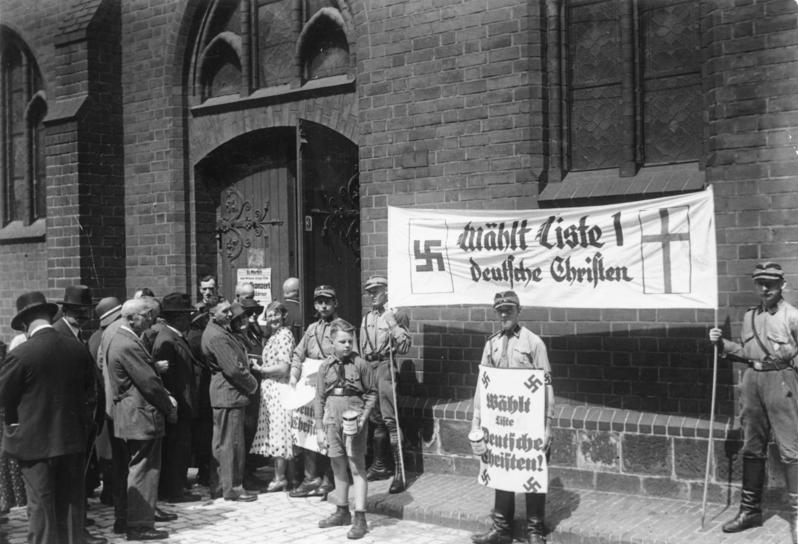 Kirchenwahl.- Propaganda der "Deutschen Christen" in Berlin ADN-ZB/Archiv Kirchenwahl am 23.7.1933 in Berlin. Wahl in der Marien Kirche am Neuen Markt. Nazistische Wahlpropaganda unter Maske des Christentums. [Kirchenwahl in Berlin.- SA-Männer vor Marienkirche mit Plakat "Wählt Liste 1 Deutsche Christen". Hitlerjunge mit Spendendose]